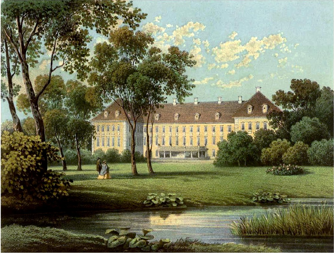 Schloss Warmbrunn, Lithografie aus dem 19. Jahrhundert